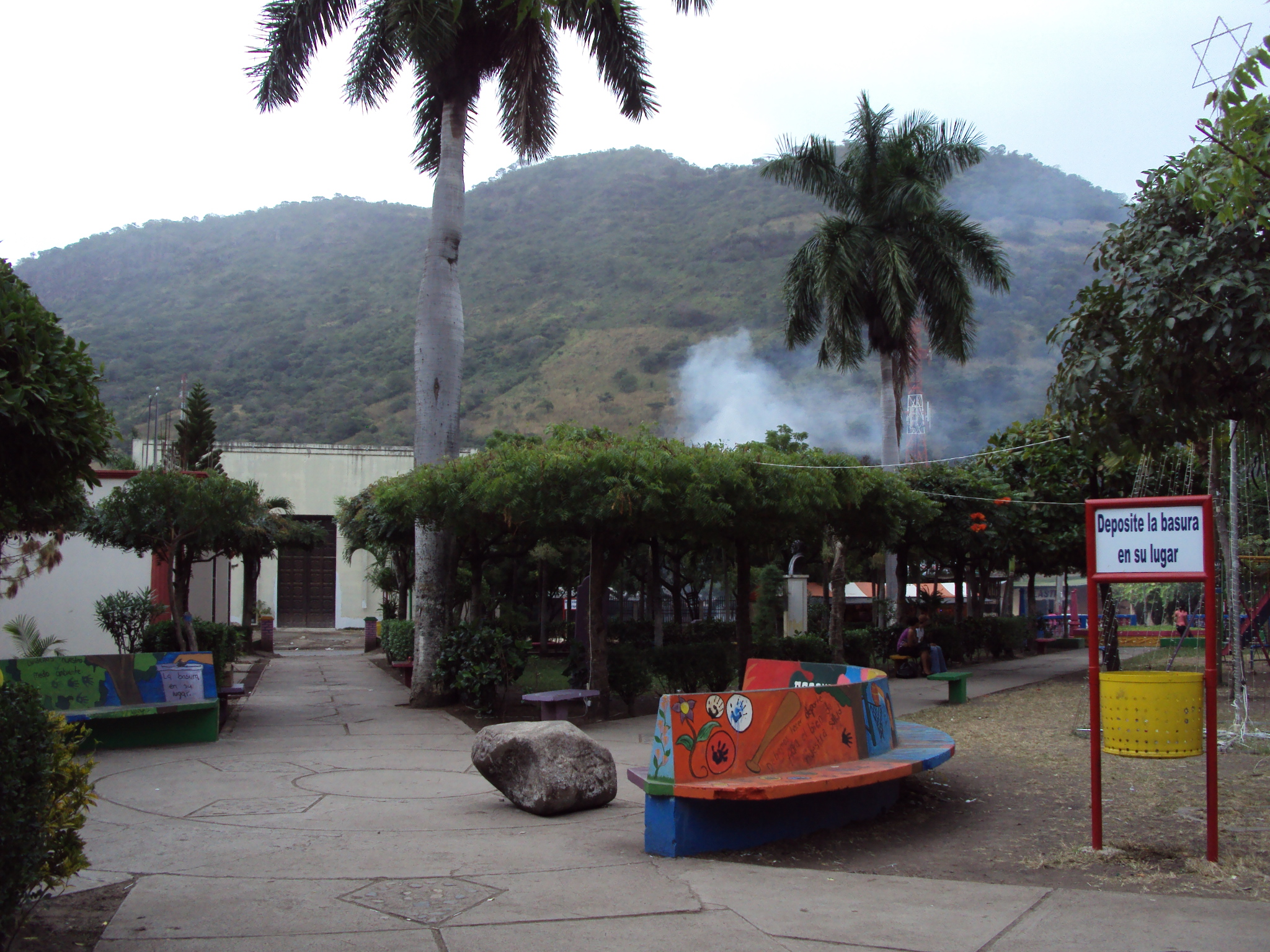 Parque Héctor Eugenio Mairena Miranda, La Trinidad, Nicaragua